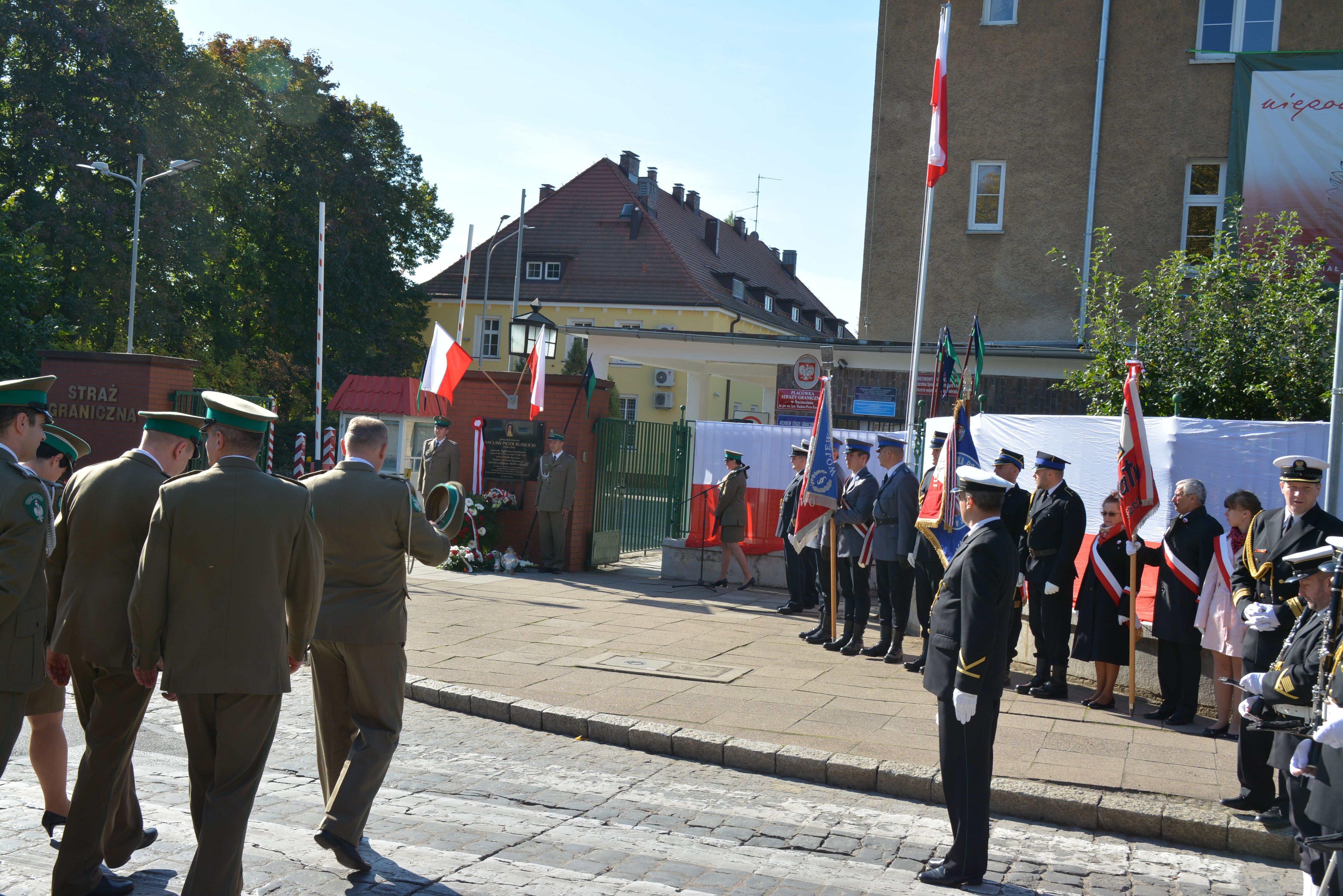 Uroczystość nadania imienia Wacława Russockiego Placówce Straży Granicznej w Szczecinie